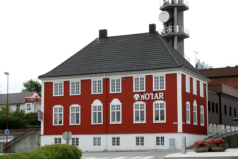 Den gamle telegrafstasjonen, Brønnøysund